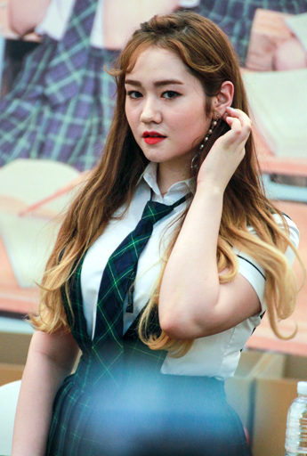 170910 프리스틴 팬싸인회